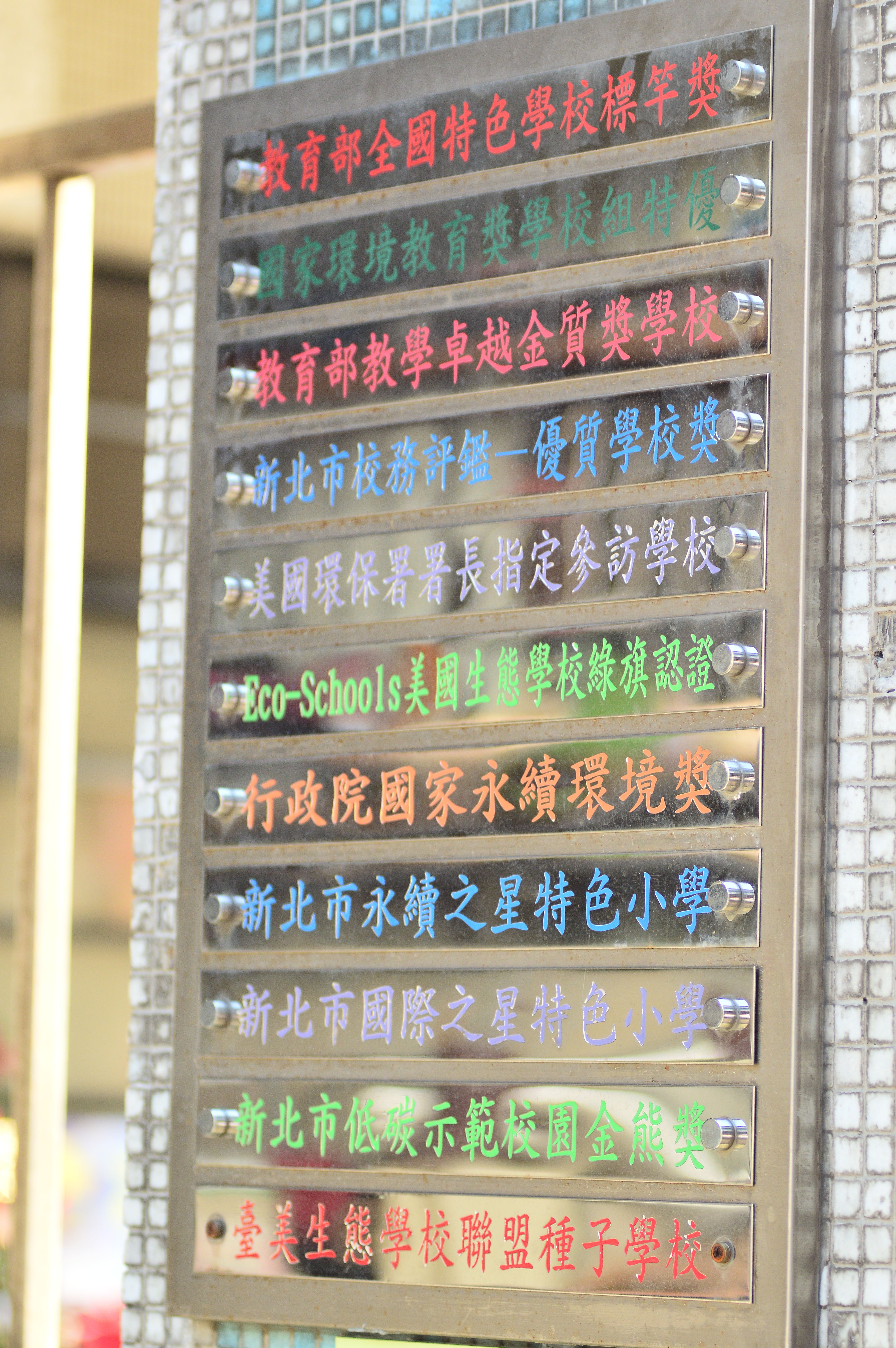 2016年新北市三峽區建安國小獲獎榮譽